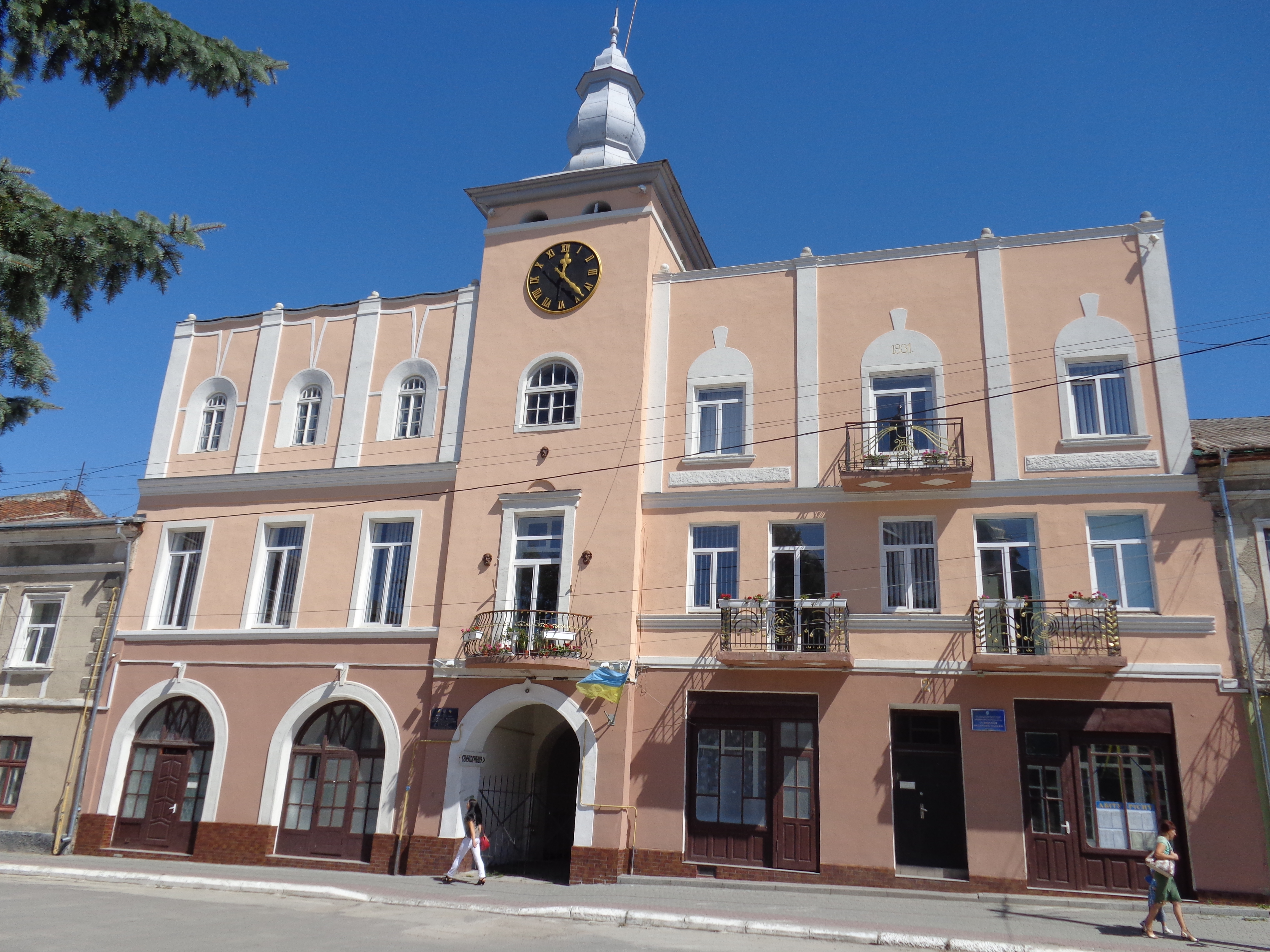 Підгаєцька ратуша